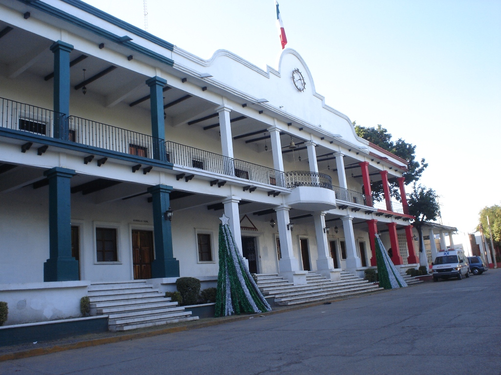 H. Ayuntamiento Municipal de Coyuca de Catalán en diciembre de 2006.